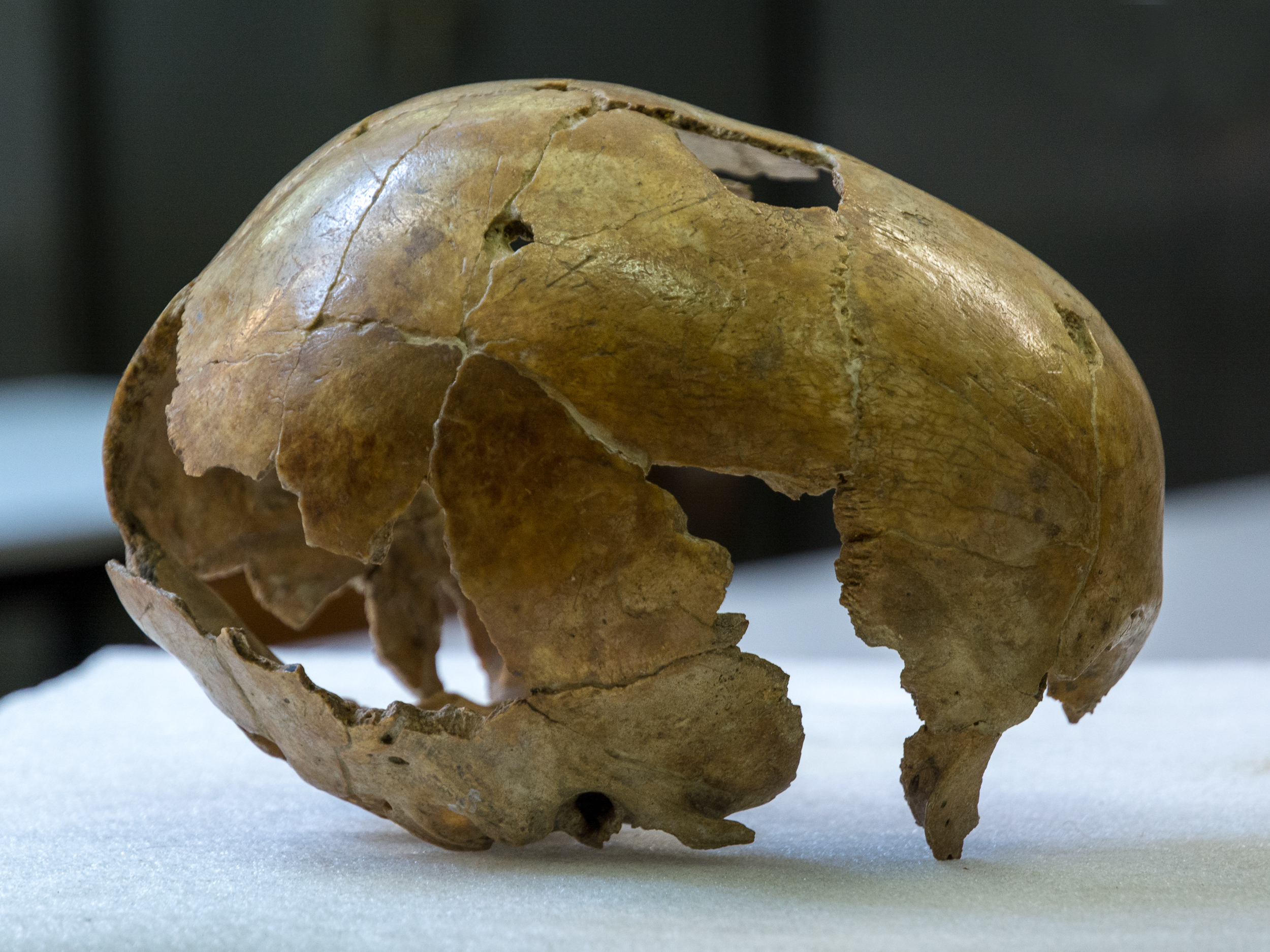 Engis 2 Schädel, Original, Universität Lüttich, Belgien.